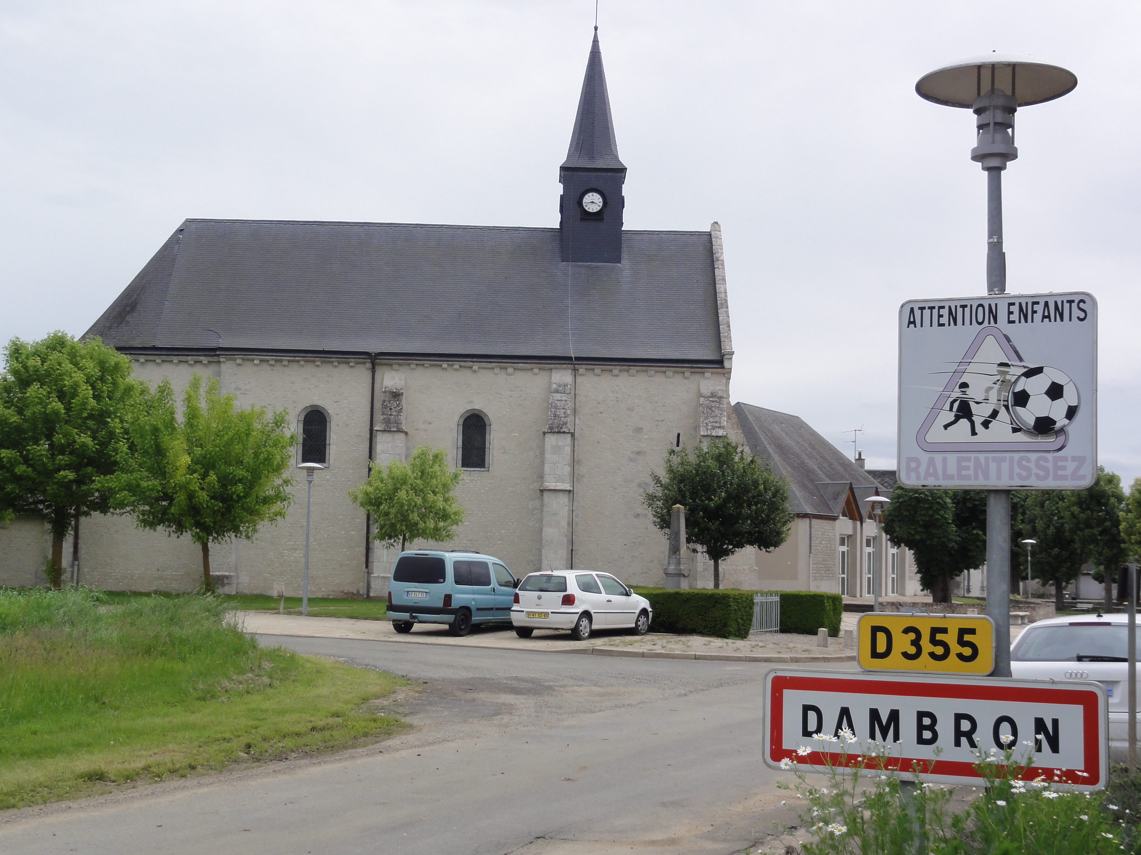 Dambron (Eure-et-Loir) Église